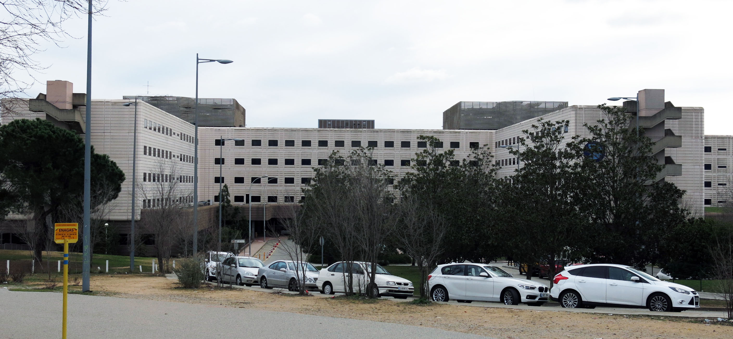 Hospital General de Catalunya (Sant Cugat del Vallès)